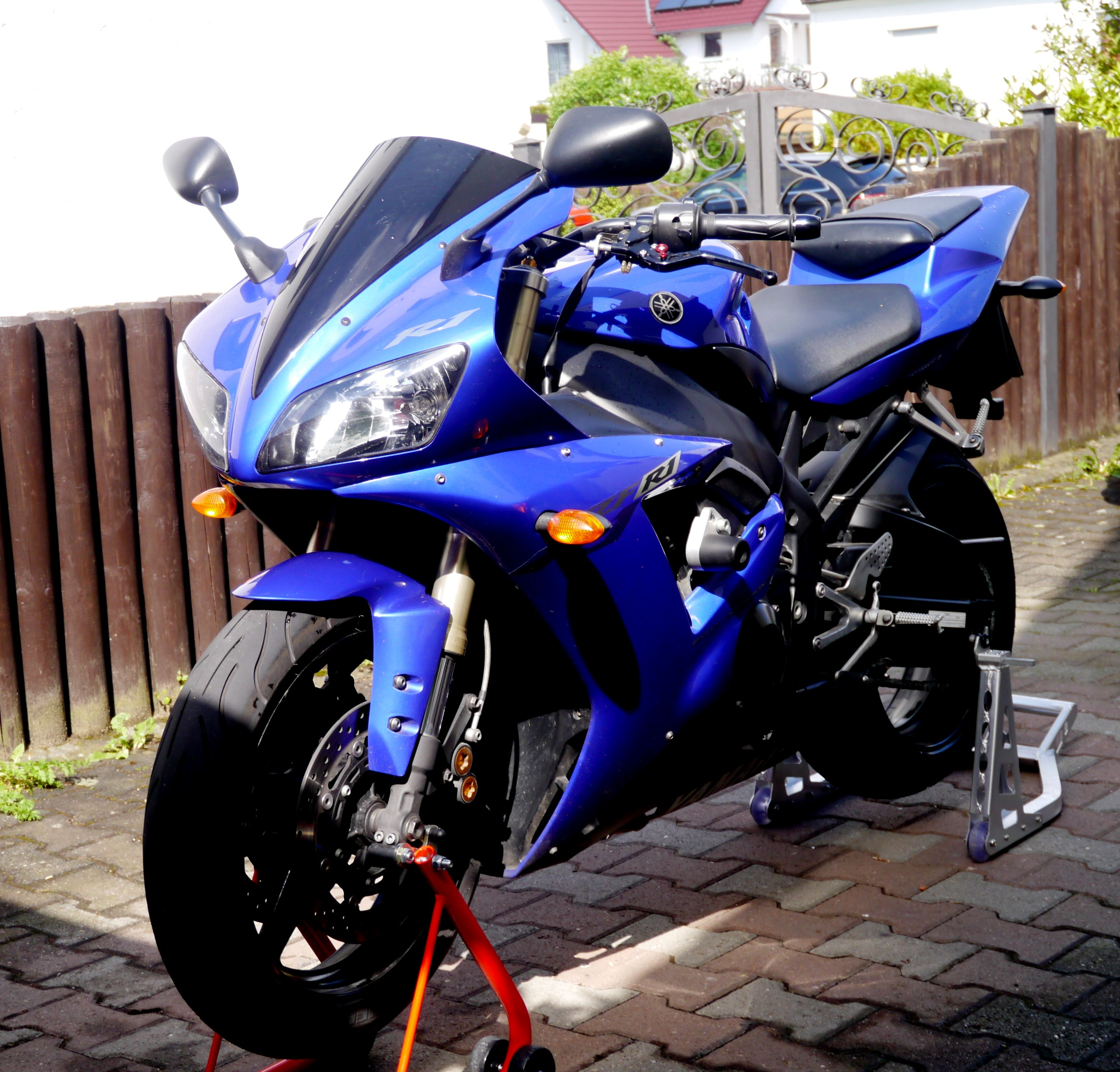 Typischer Vertreter der RN09 Modellreihe